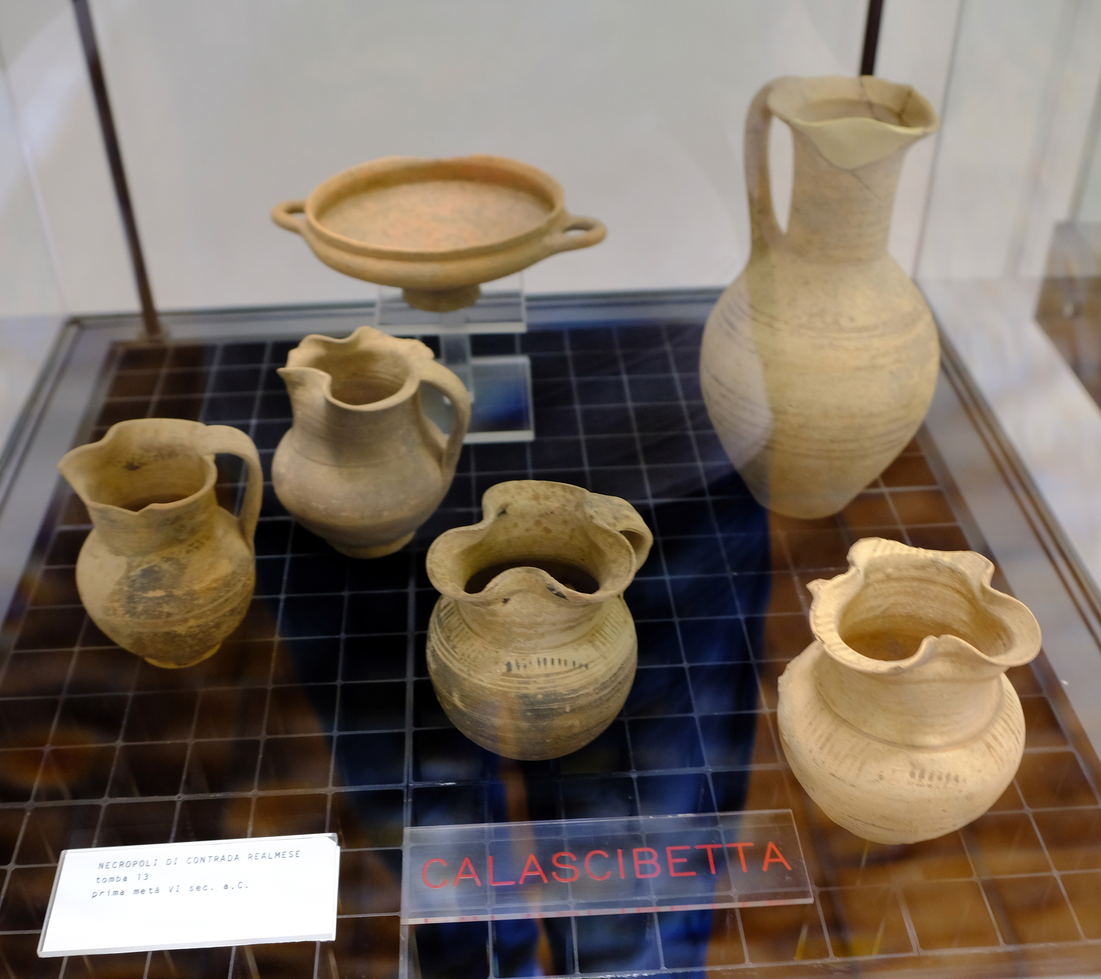 Ceramica della necropoli di Realmese